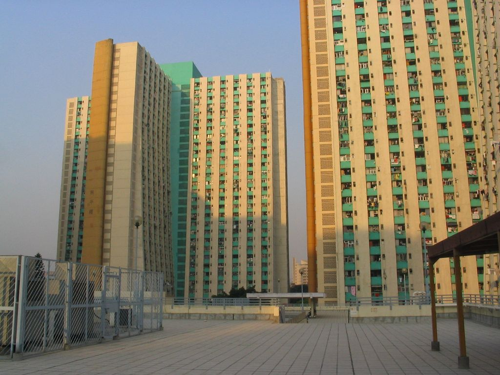 大興邨 Tai Hing Estate